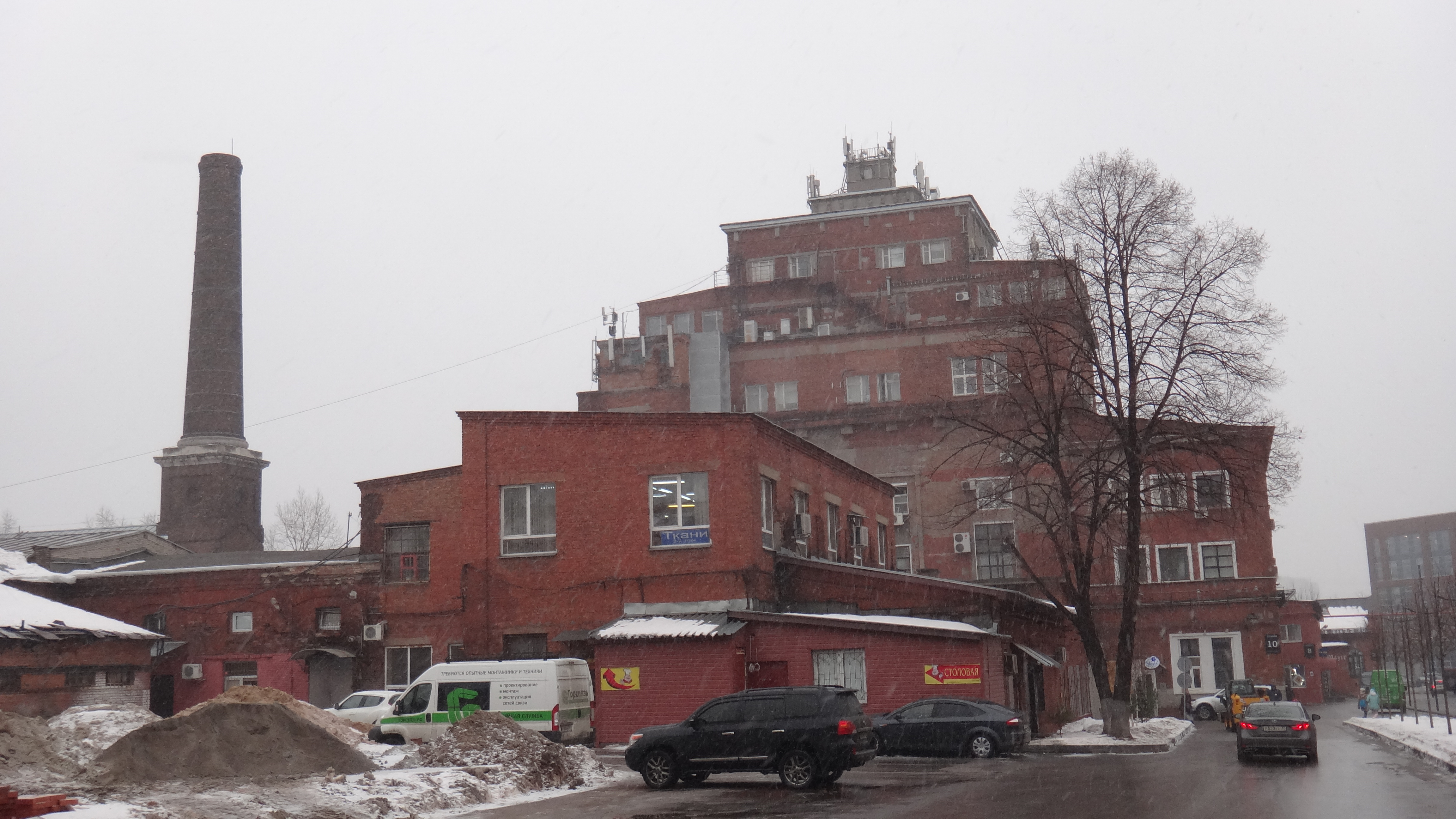 Basmanny District, Moscow, Russia // Газогенераторное здание Московского газового завода в Сусальном переулке. 1931-1932, арх. Николай Дмитриевич Морозов